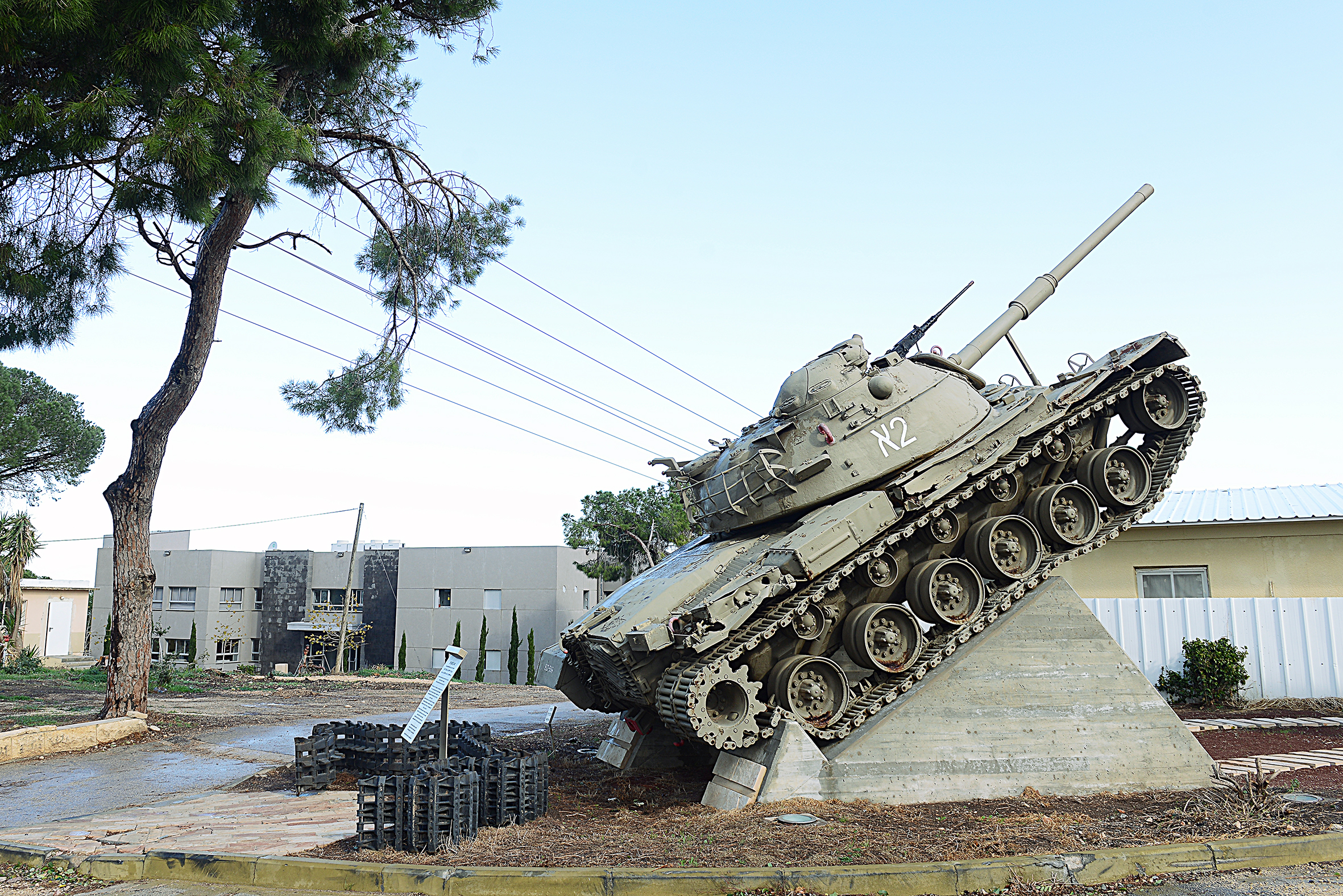 אנדרטת טנק הצוערים בפנימייה הצבאית בחיפה, 2017